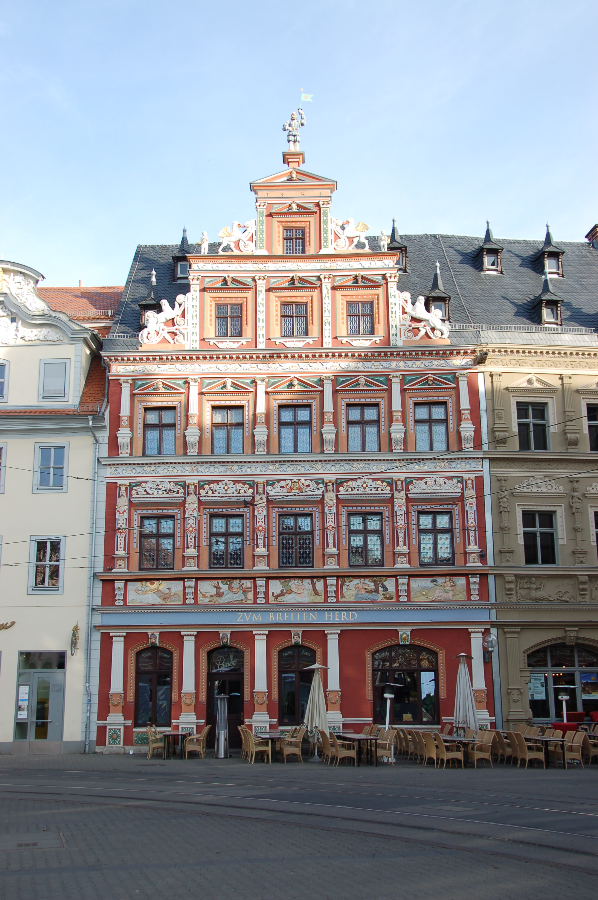 Haus Zum Breiten Herd (Erfurt); farbiger Teil der Fassade